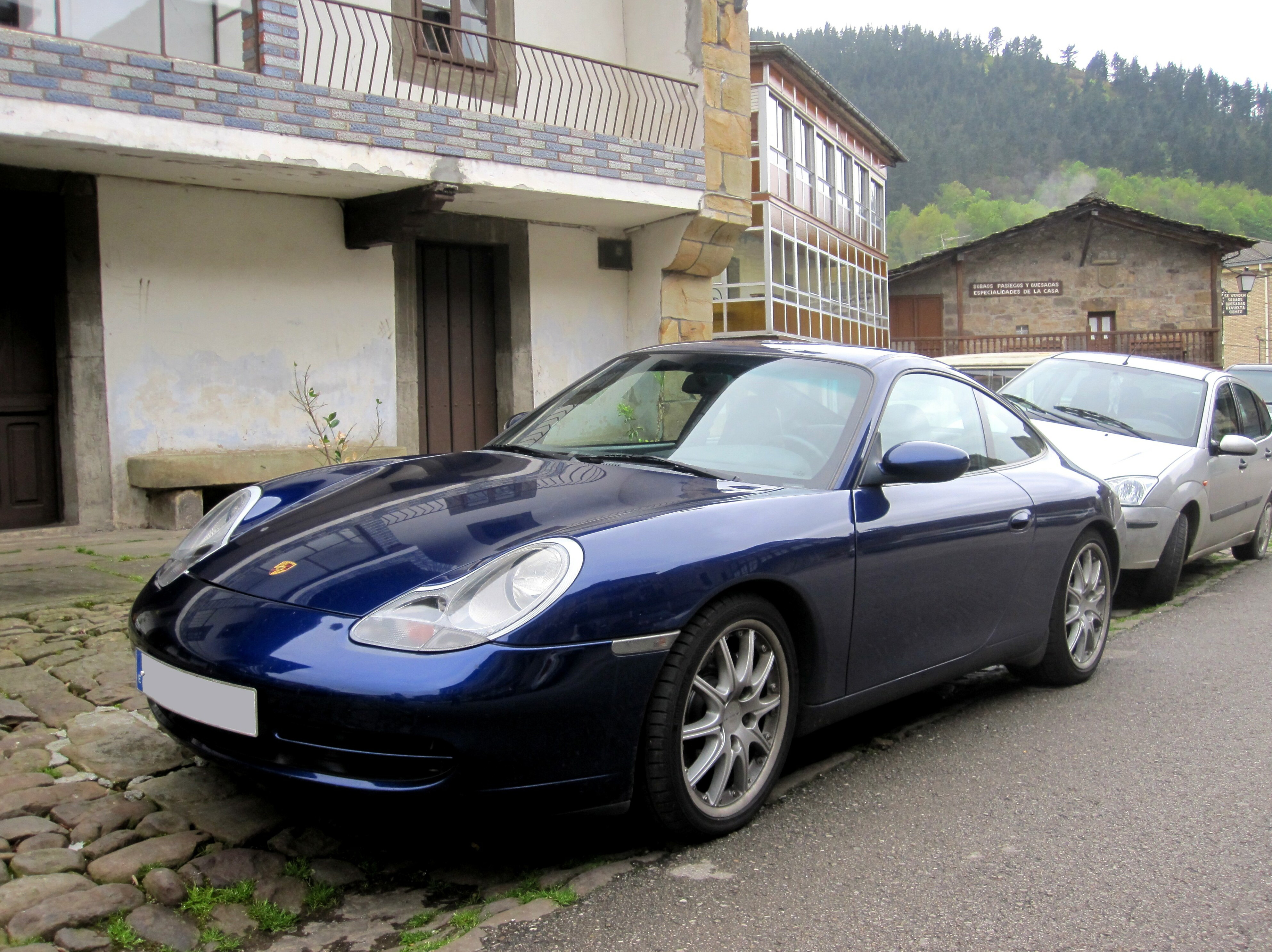 2006 Porsche 911 Carrera 4 [996]